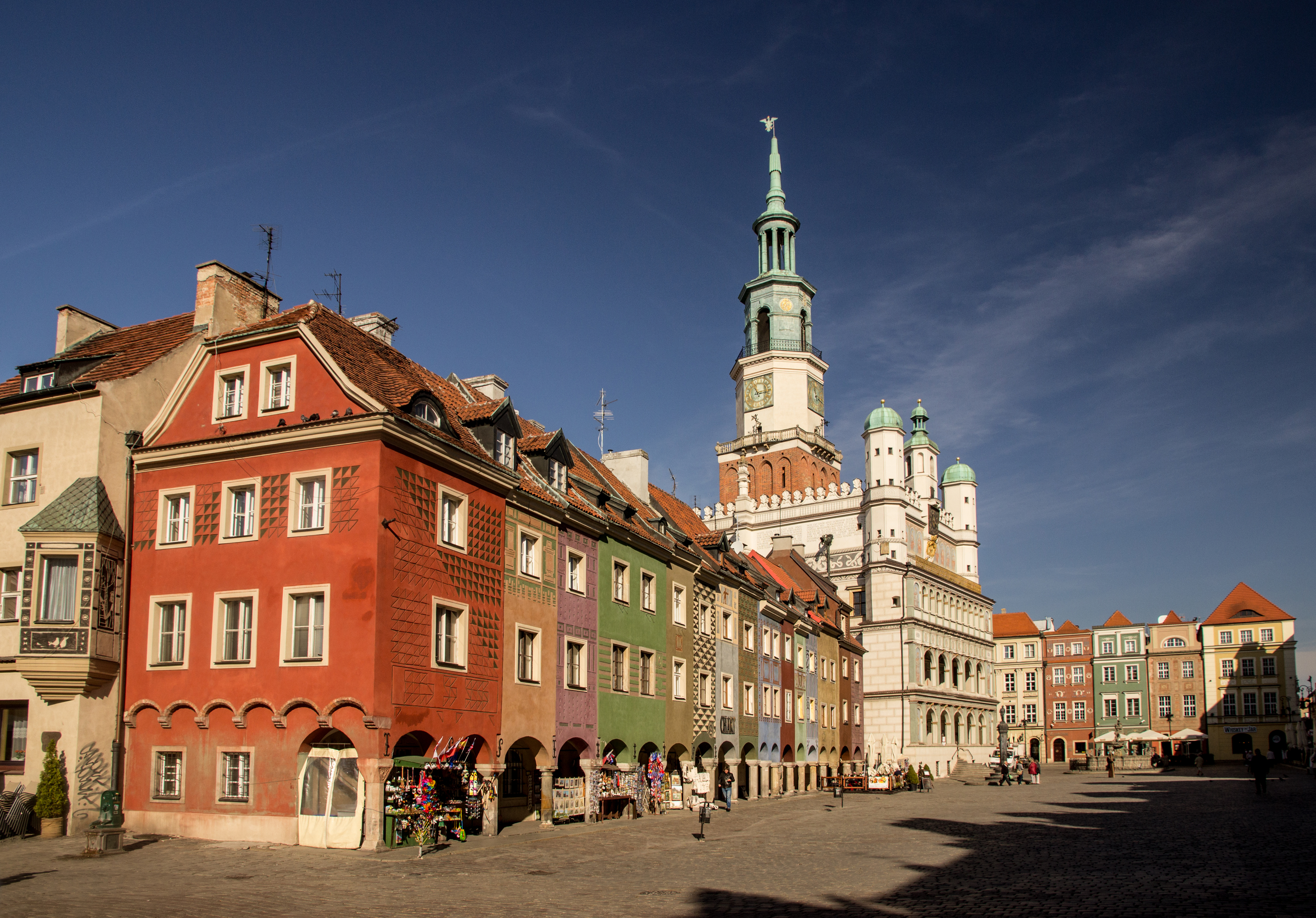 Domki Budnicze